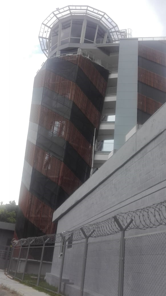 Torre de control Aeropuerto Centenario de Armenia, Colombia